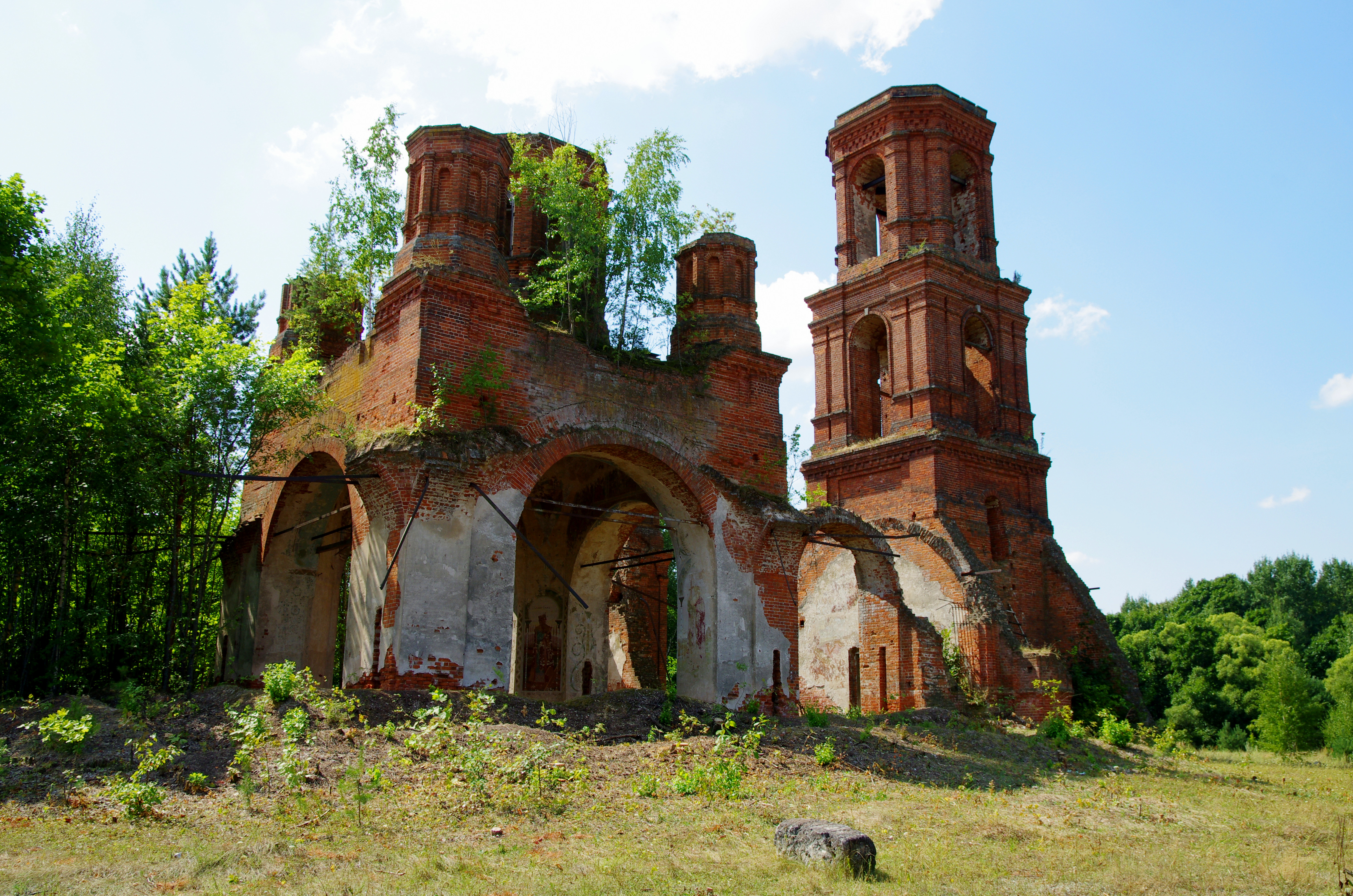 Церковь Николаевская с Ильинским приделом: Ялмонт, Клепиковский район, Рязанская область